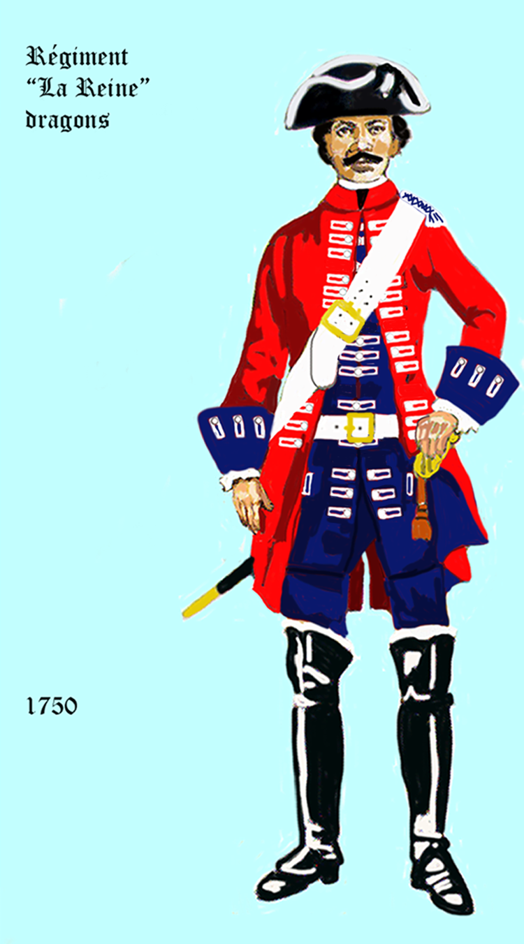 Uniforme d' un régiment de dragons française de 1750